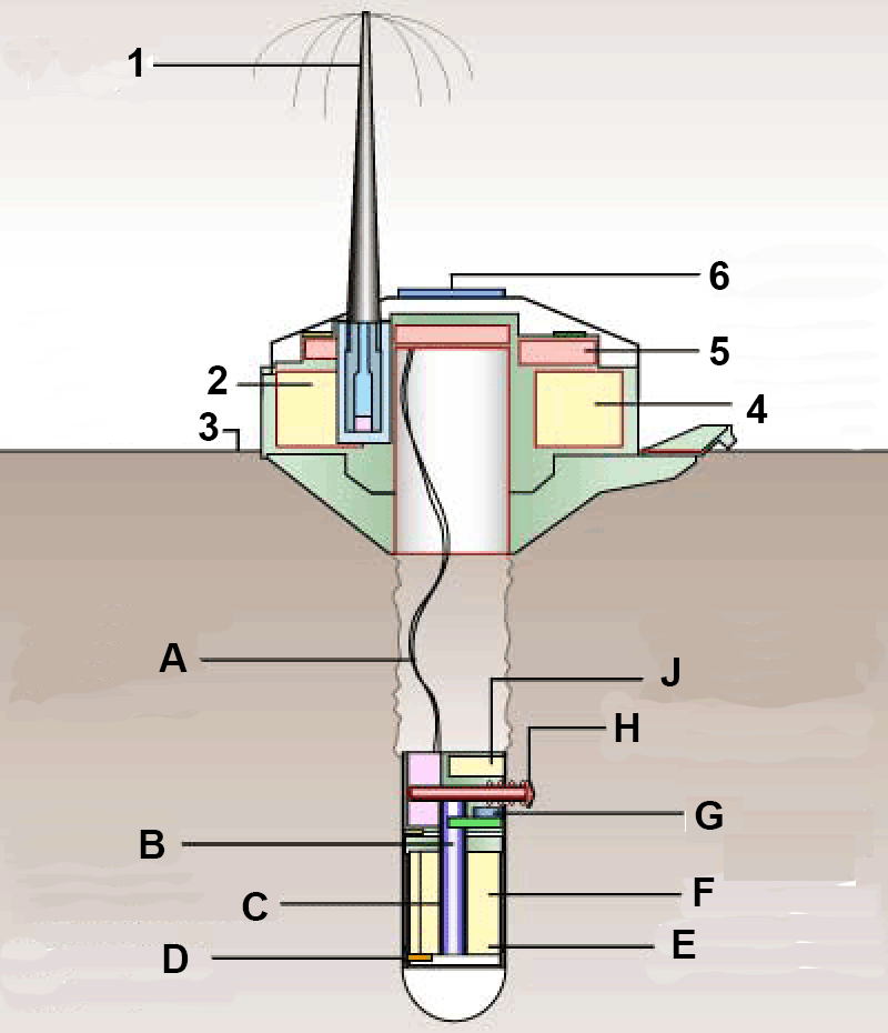 Schéma du pénétrateur (sonde spatiale) Deep Space 2 de la NASA